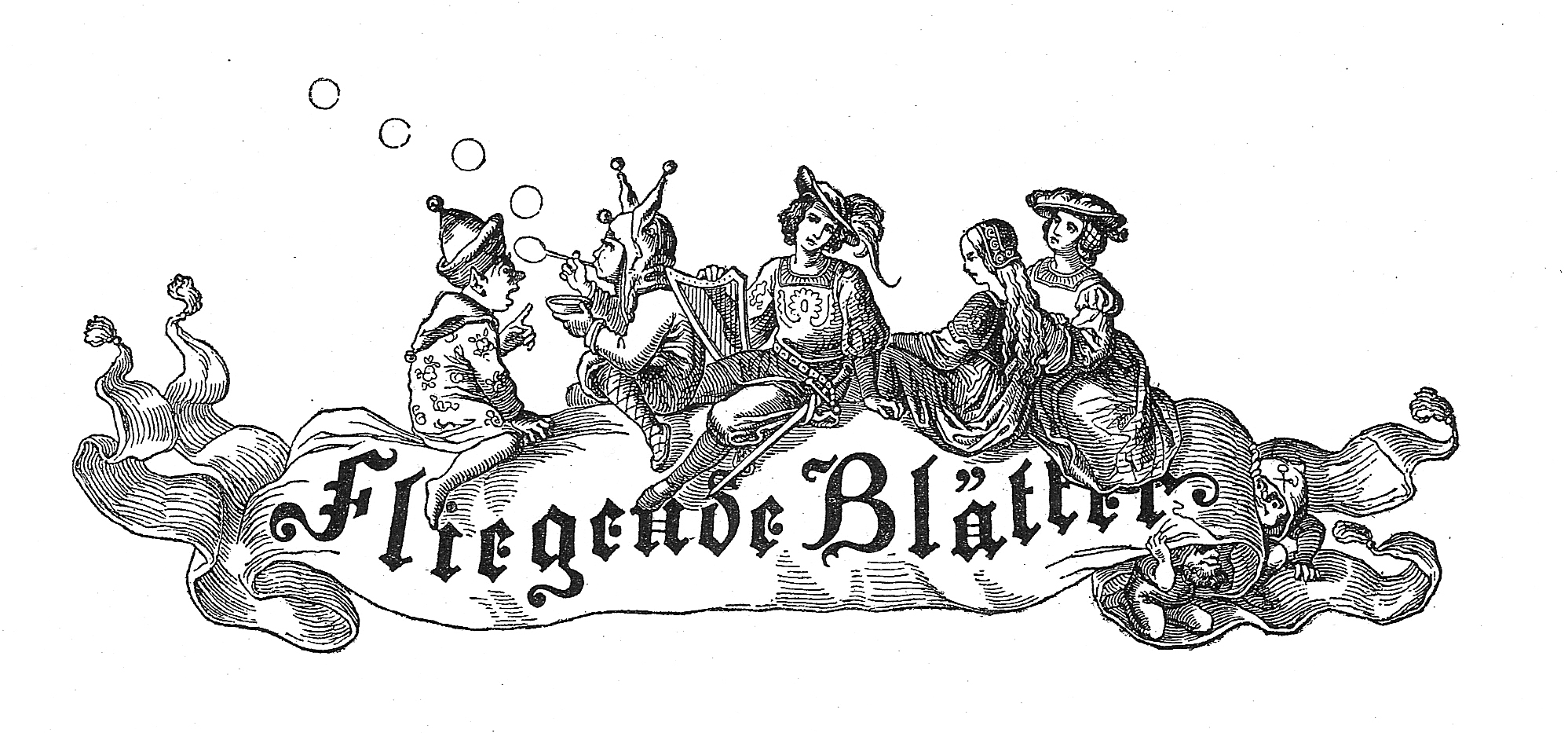 Kopftitel der Fliegenden Blätter. Scan --Goerdten 23:31, 1. Feb. 2007 (CET)